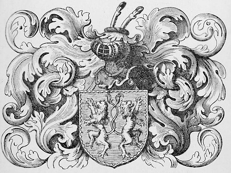 Ex libris